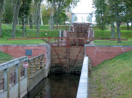 Немново, шлюз "Немново" Августовского канала